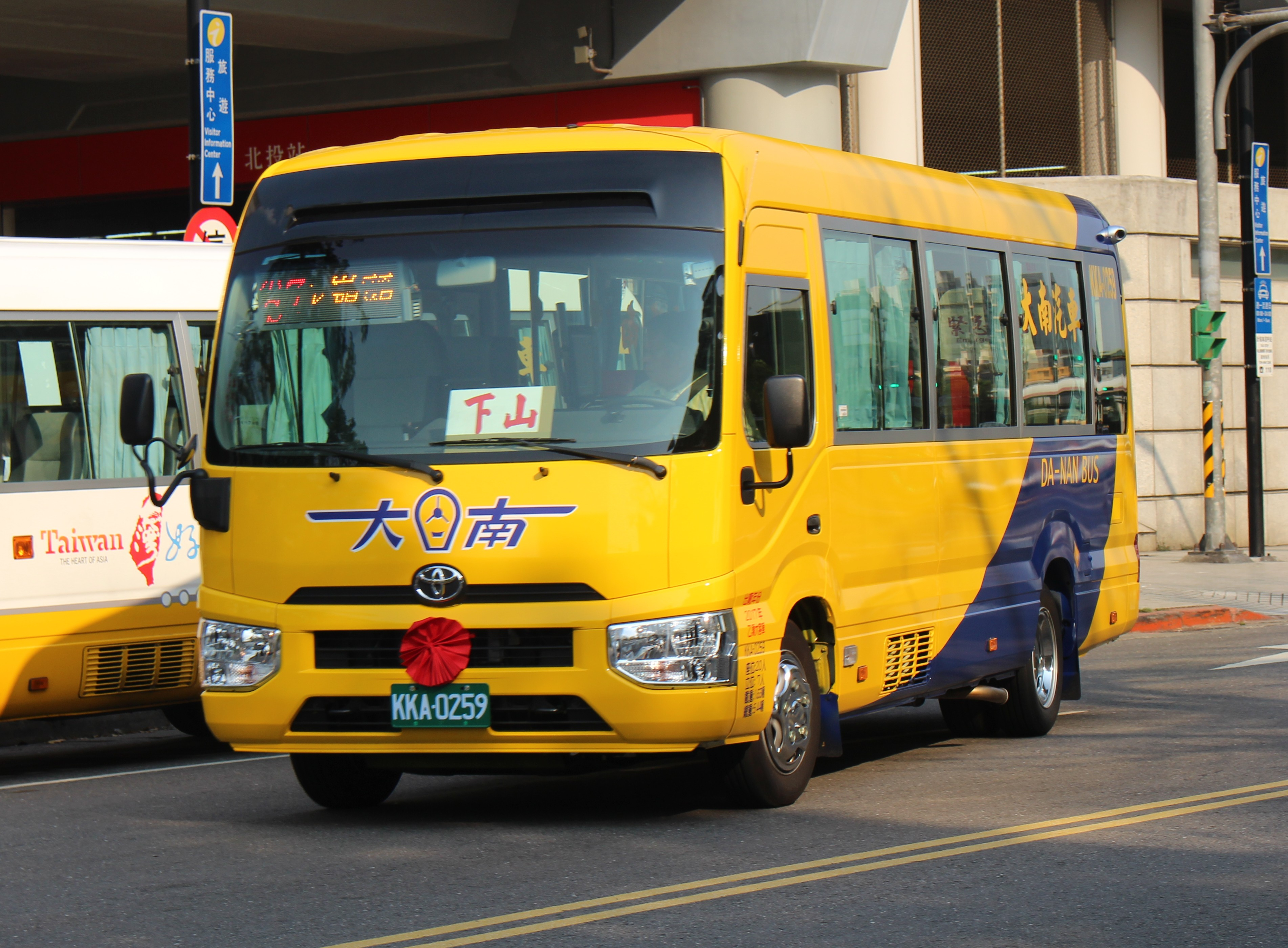 大南汽車2017年豐田Coaster中型巴士KKA-0259，駛離台北捷運北投站。